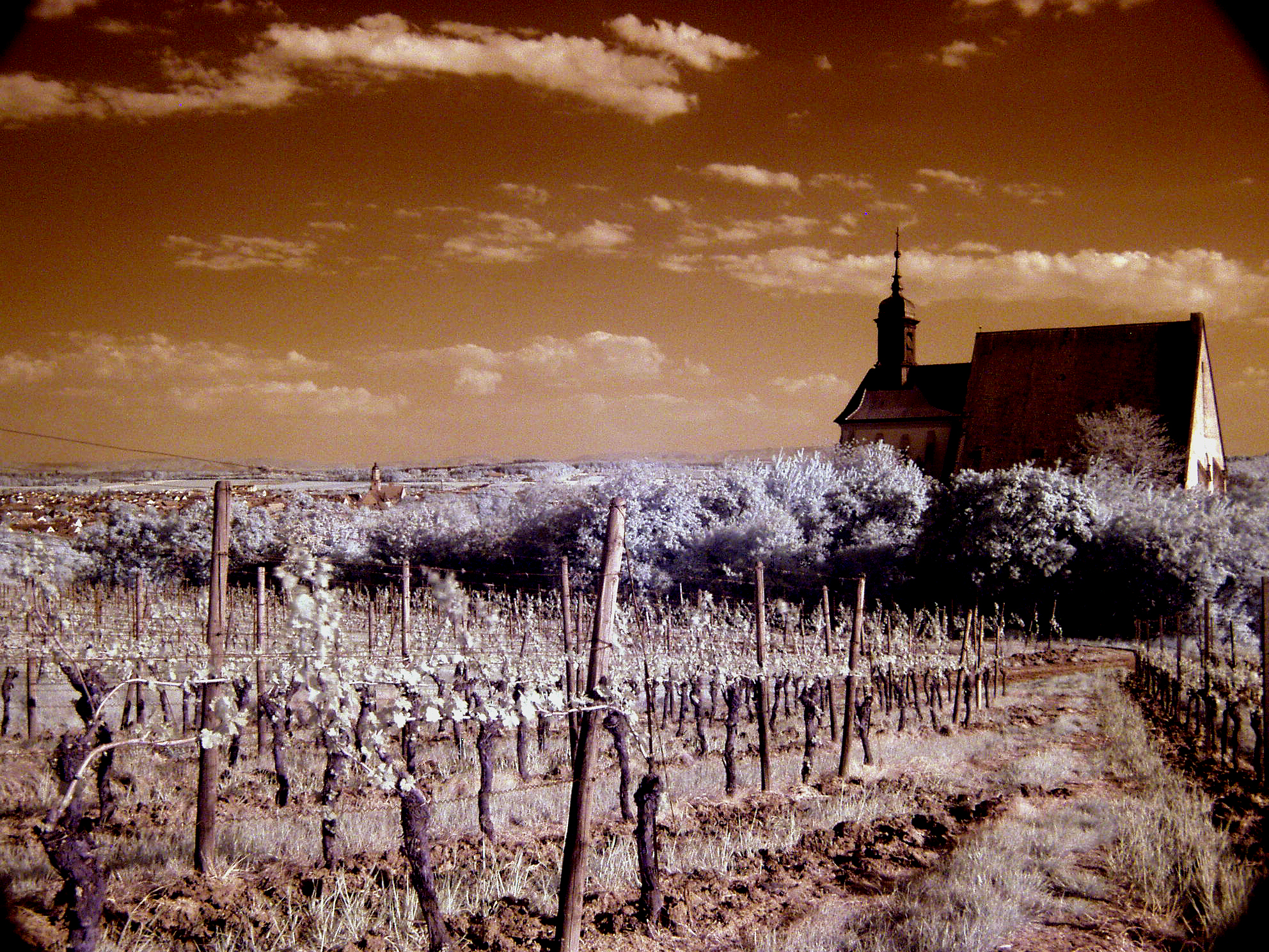 Kapelle 'Maria im Weingarten' bei Volkach / Main, Unterfranken (Infrarotfotografie).